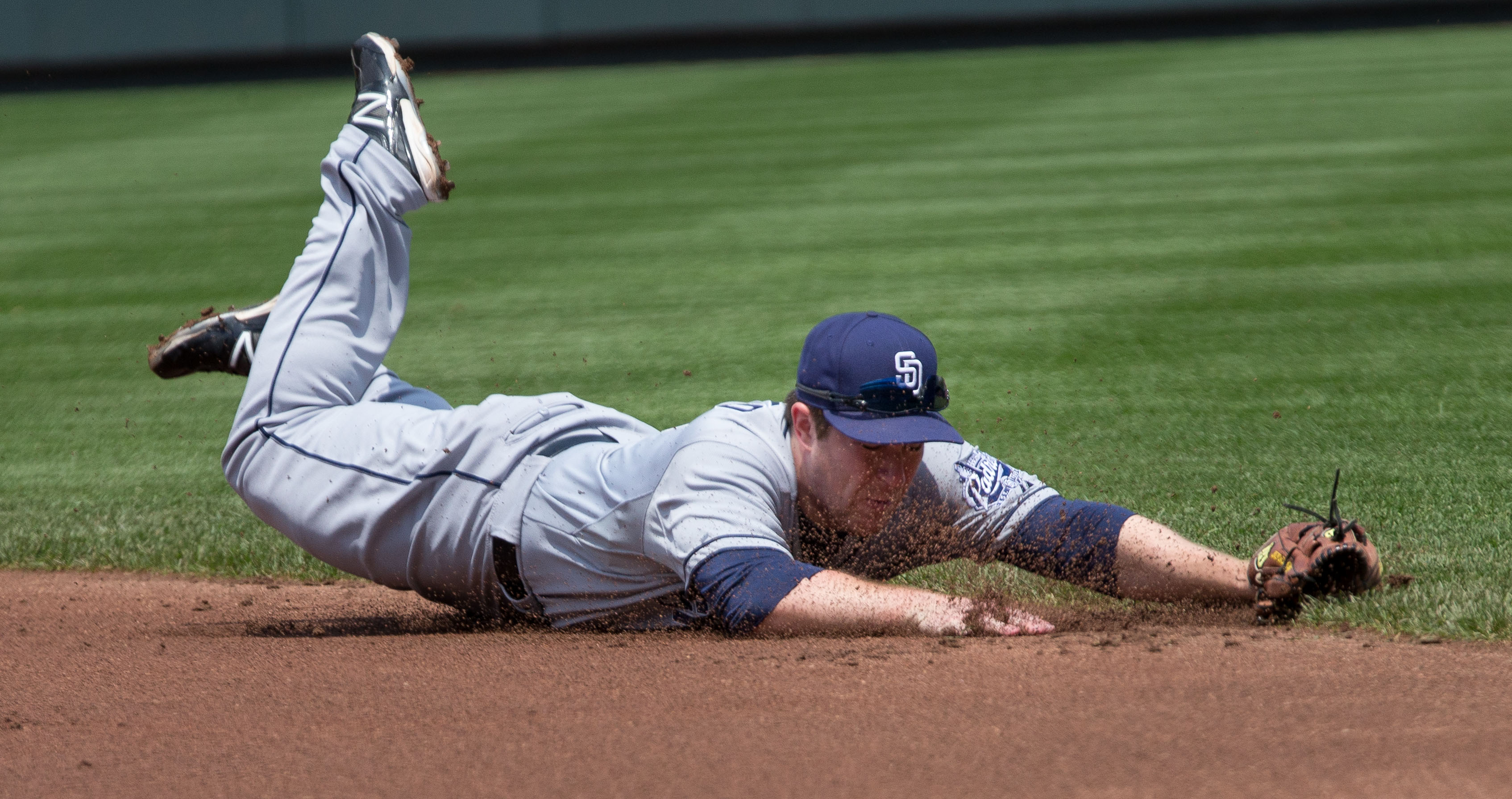 San Diego Padres at Baltimore Orioles May 15, 2013